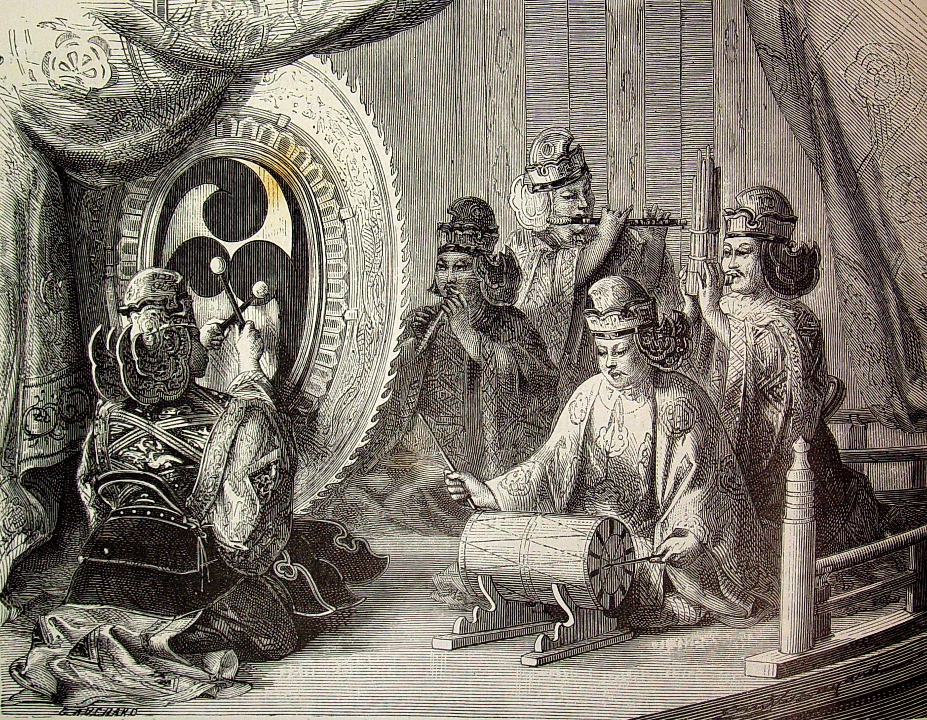 "Instrumentos de musica japonesa. El Hing-Ku". Ilustraciones pertenecientes al libro : El mundo físico : gravedad, gravitación, luz, calor, electricidad, magnetismo, etc. / A. Guillemin. - Barcelona Montaner y Simón, 1882